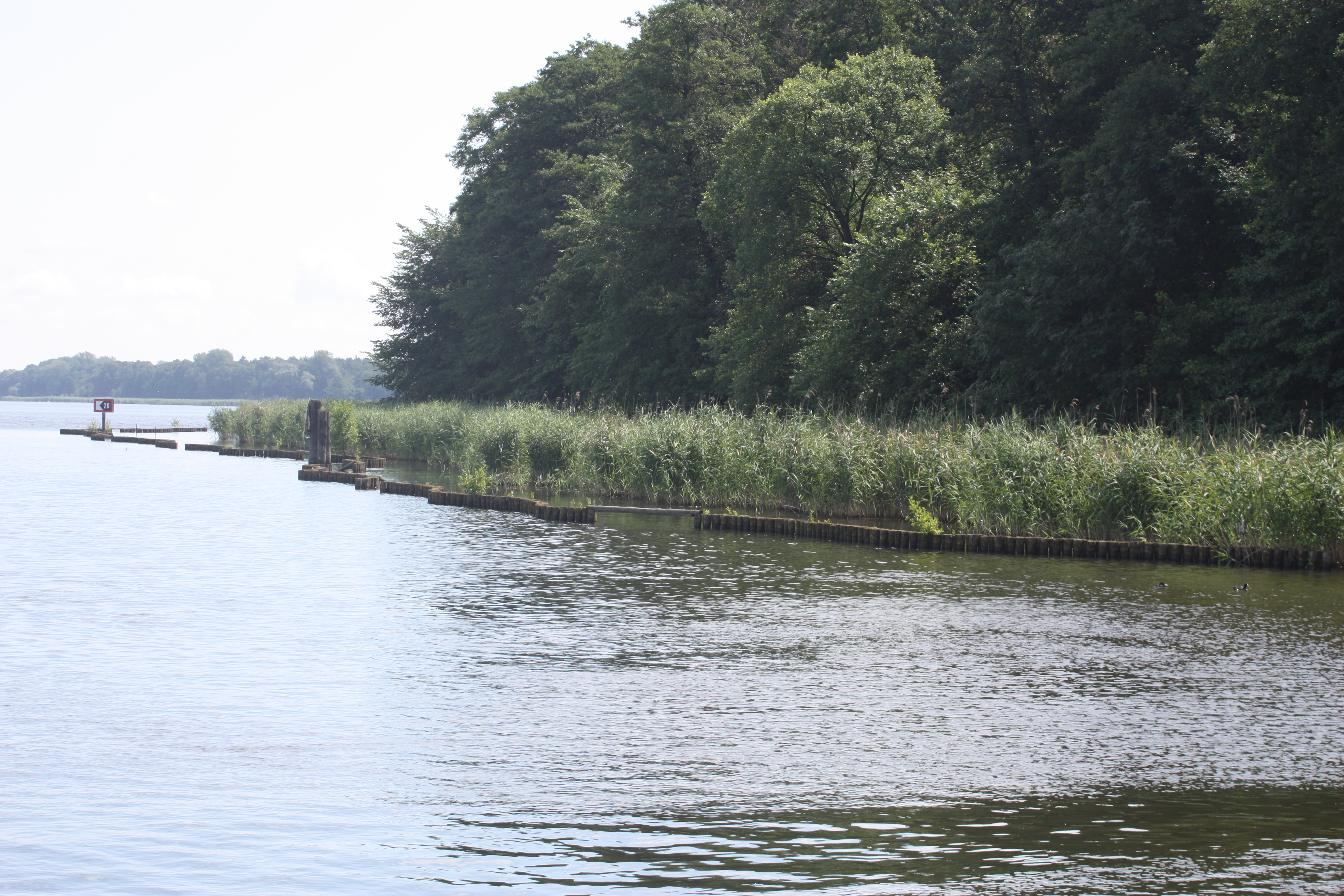 Müggelsee, Berlin, Rübezahl